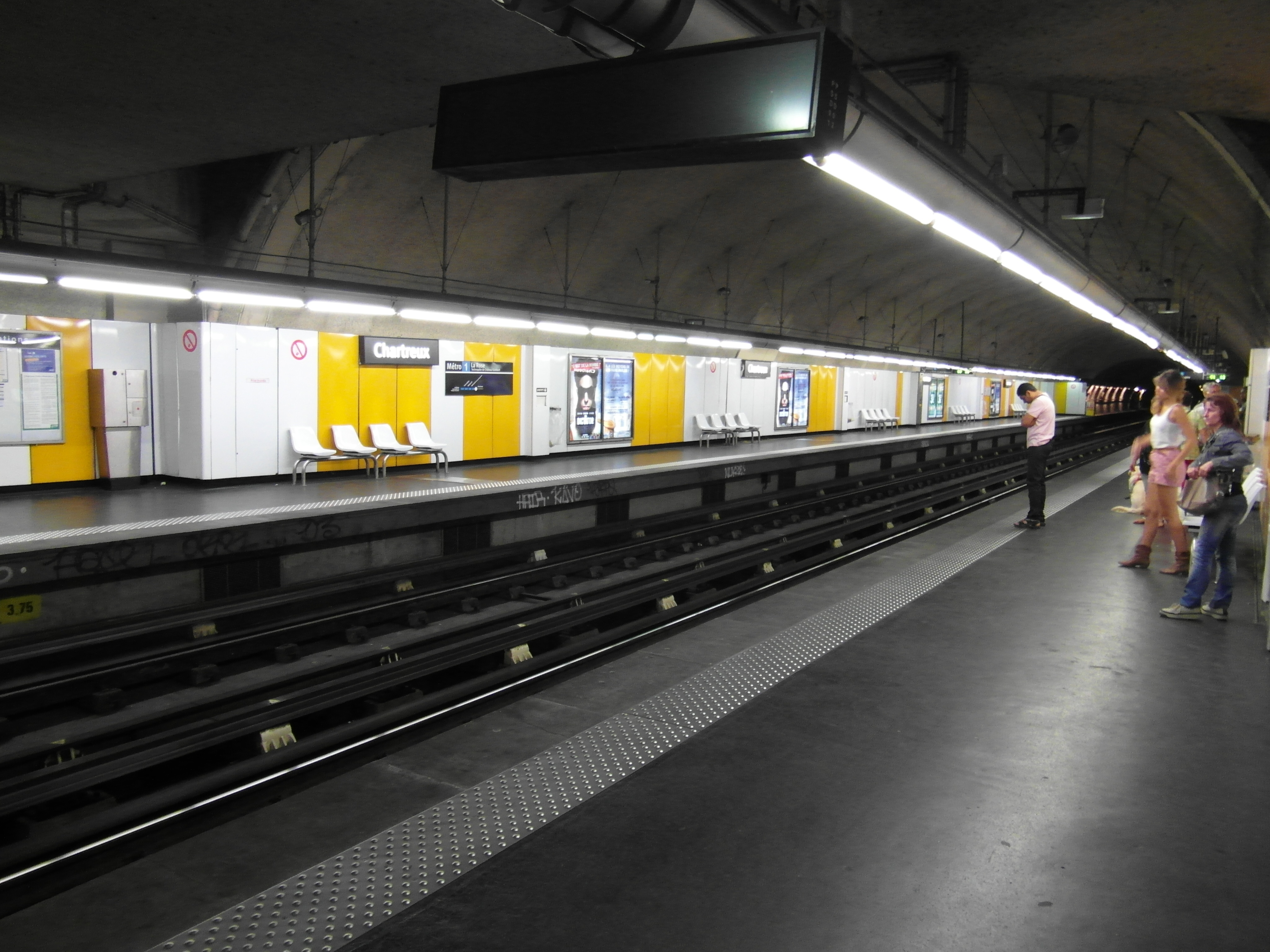 Marseille - Métro - Chartreux